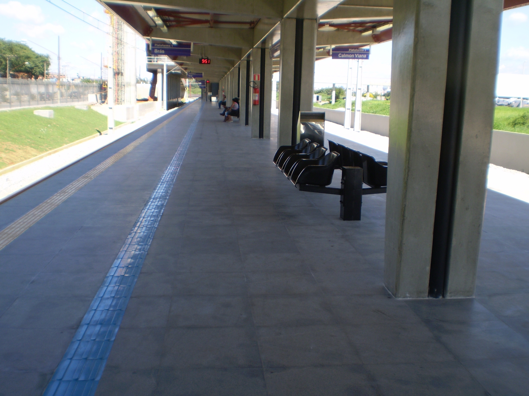 Estação USP Leste da linha F da CPTM